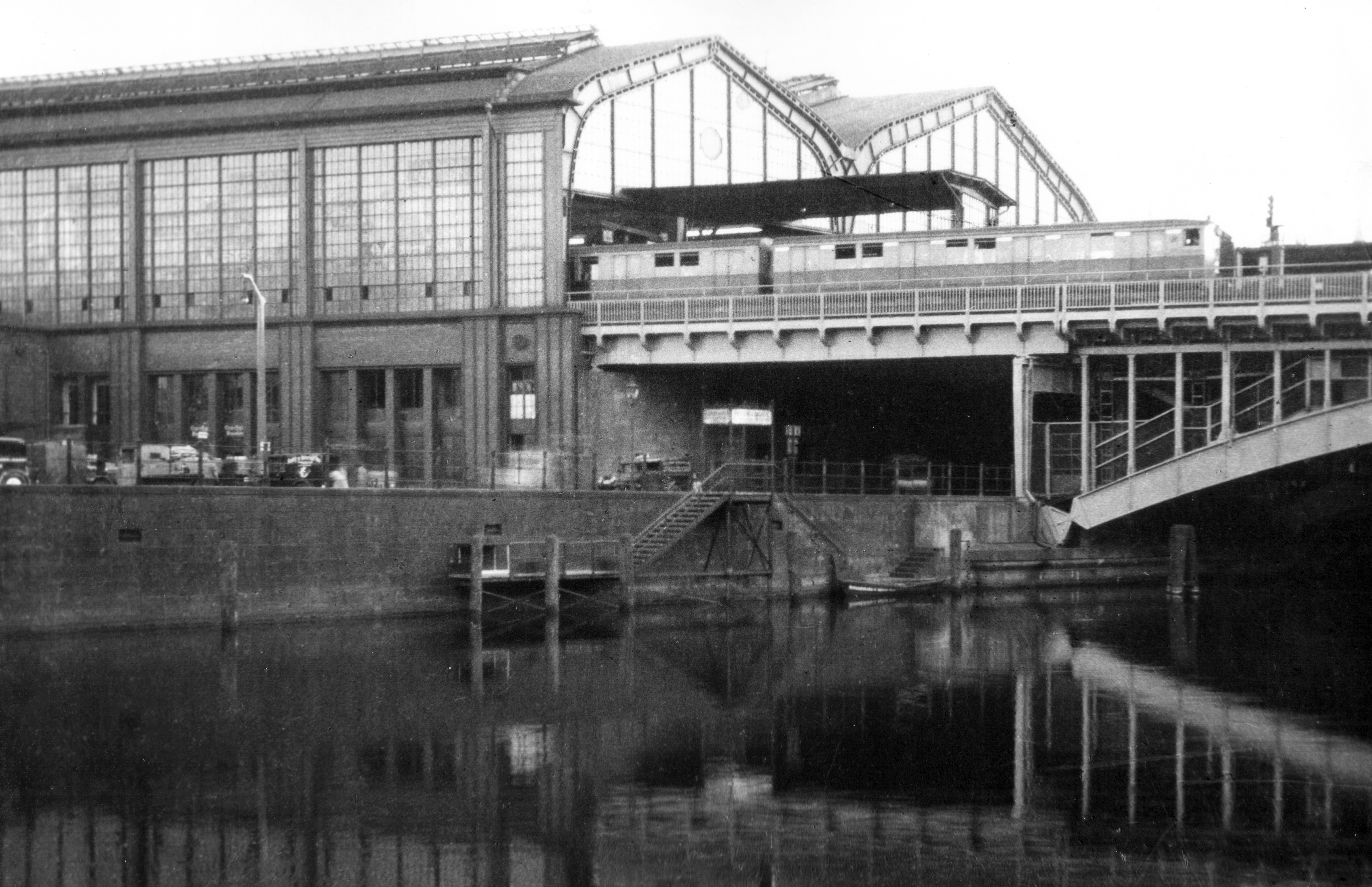 Friedrichstrasse pályaudvar. Location: Germany, Berlin Tags: train station Title: Friedrichstrasse pályaudvar.